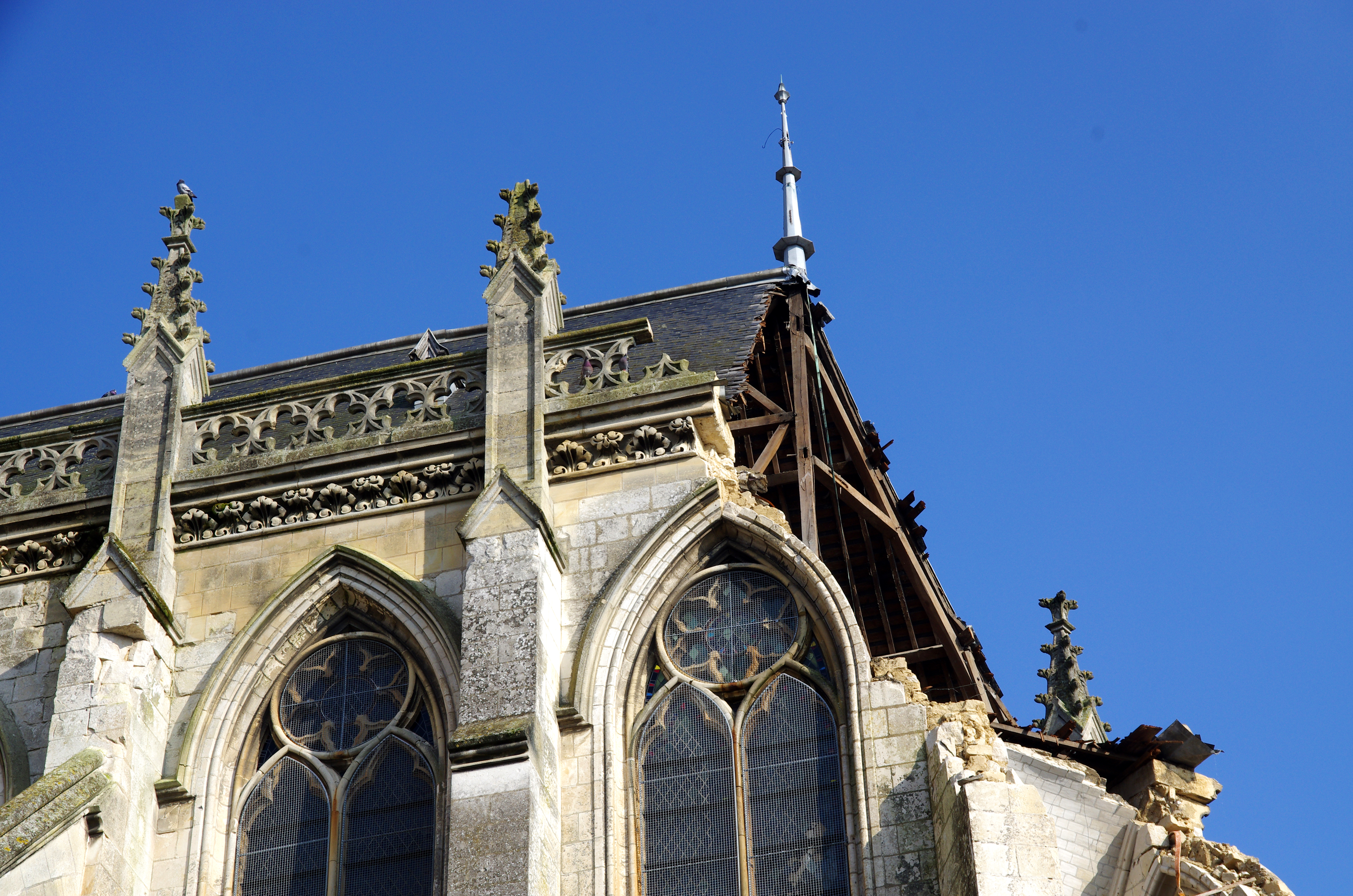 Abbeville (Somme, France) - L'église Saint-Jacques a son chevet éventré (suite aux interventions de "sécurisation" de la semaine précédente) et est condamnée à la démolition qui aura lieu à la mi-février 2013. Depuis les importantes chutes de pierres en 2009 et début 2010, une barrière entourait complètement l'édifice, sauf devant le portail principal (au pied du clocher, façade Ouest). .